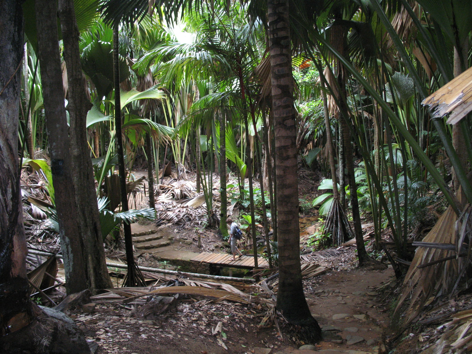 Seychellenpalmenwald auf Praslin